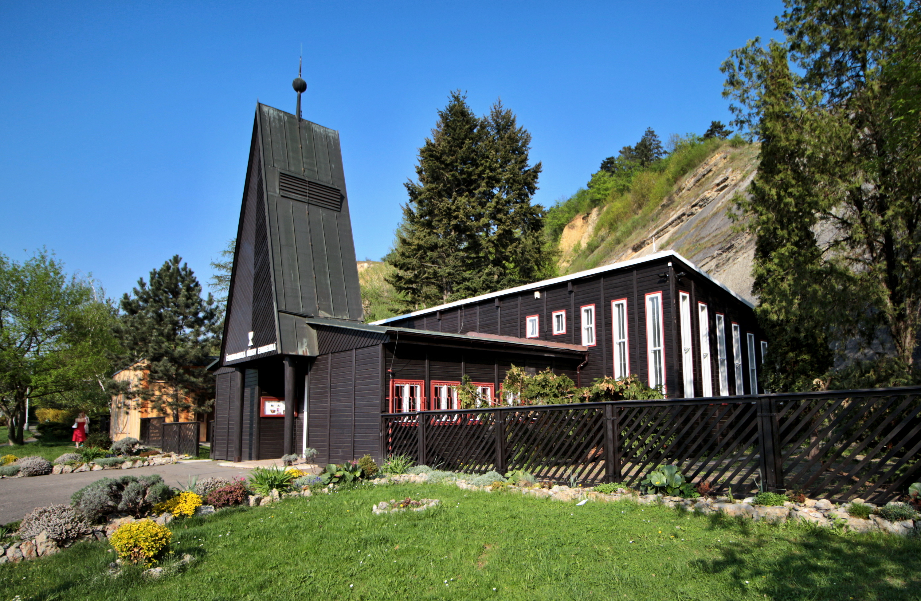 Evangelický kostelík v Praze-Braníku